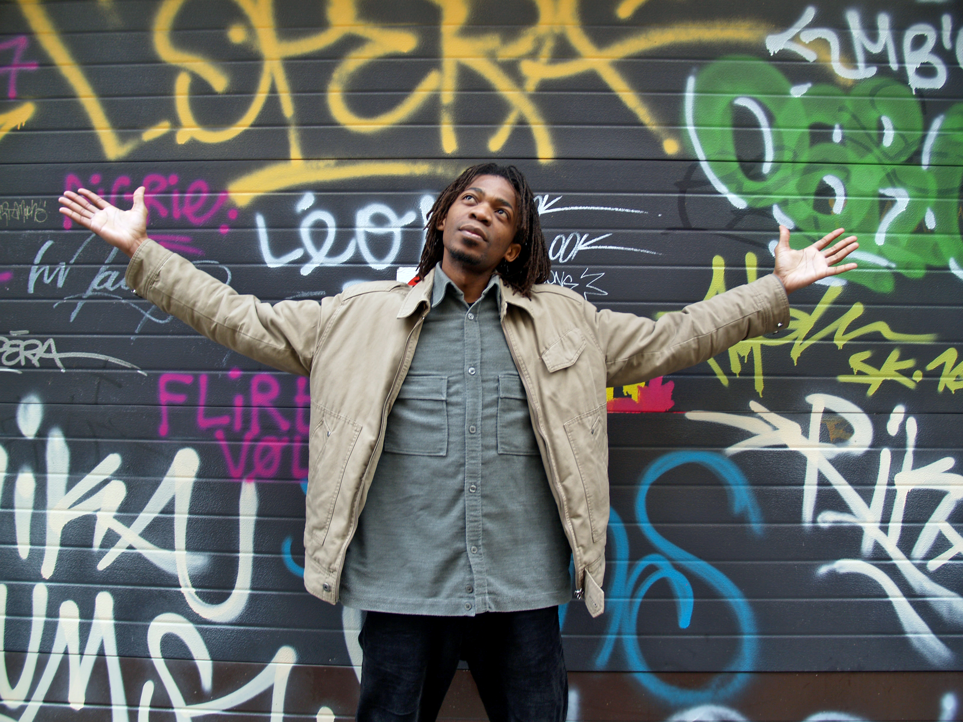 Le dessinateur congolais Hallain Paluku